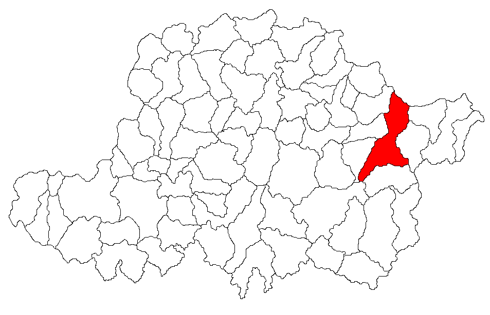 Categorie:Hărţi ale judeţului Arad